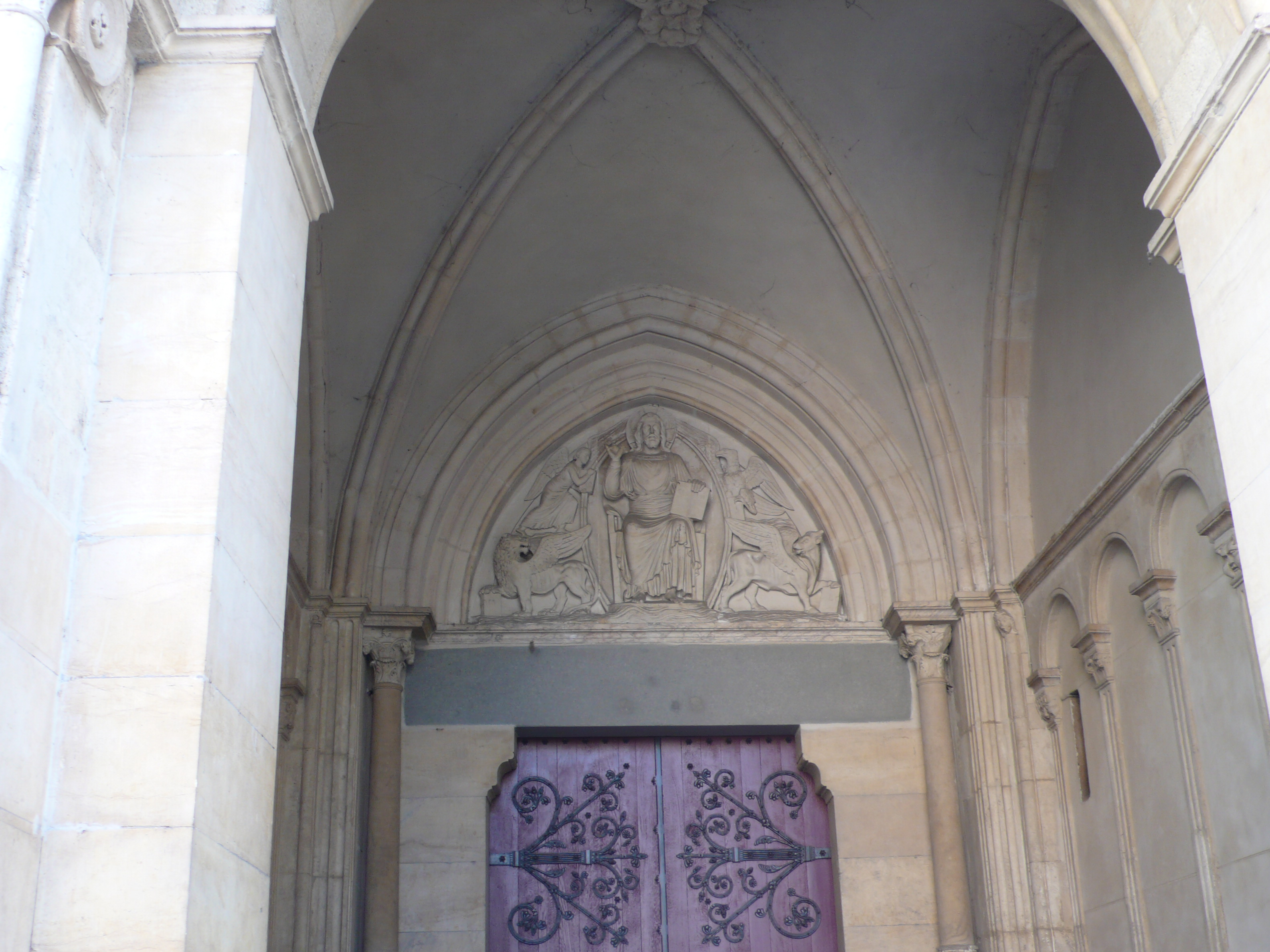 église romane de Saint-Martin d'Ainay, à Lyon. .